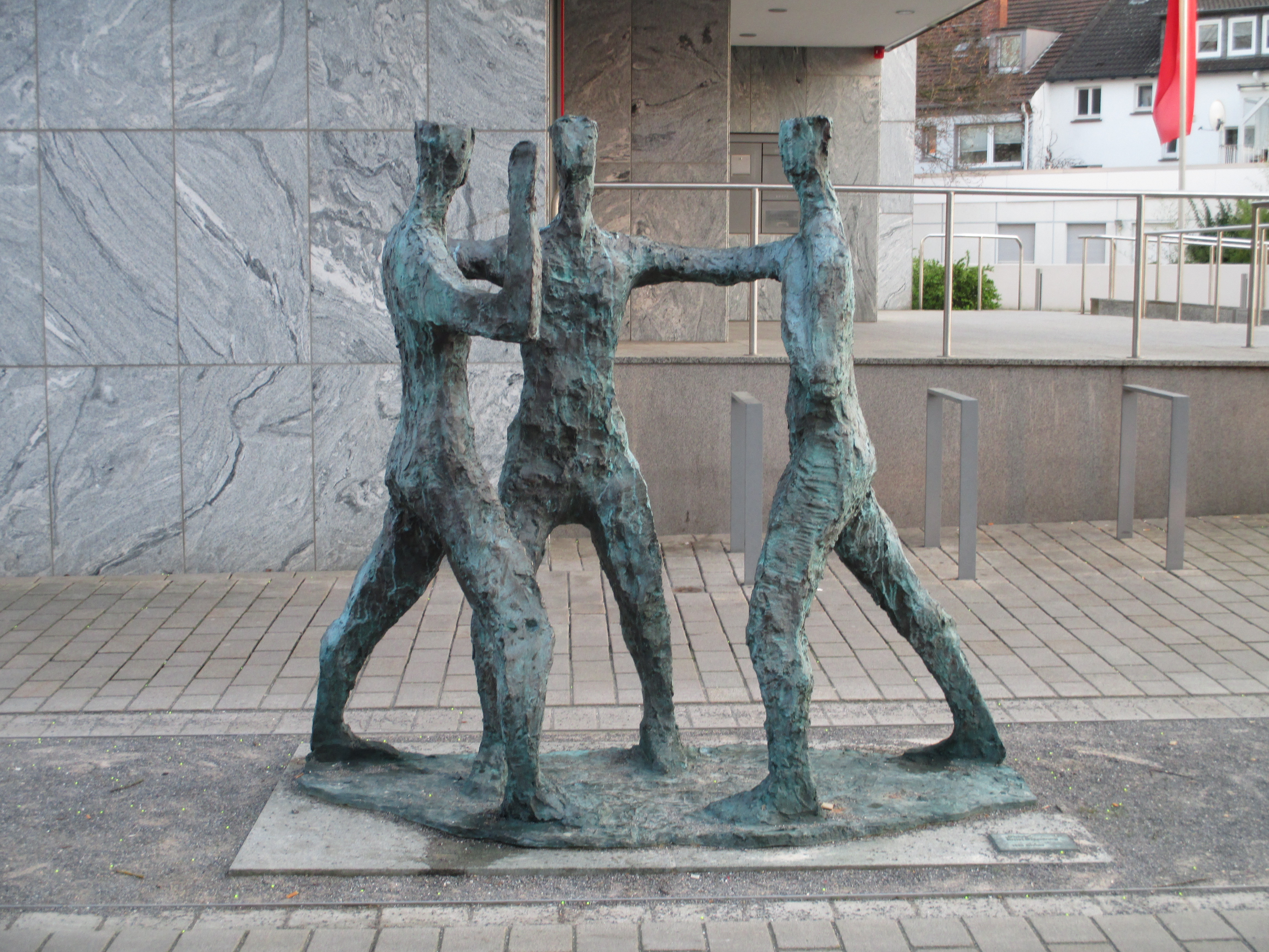 Skulptur "Dialog" (1982) von Ernst Oldenburg vor der Sparkasse.